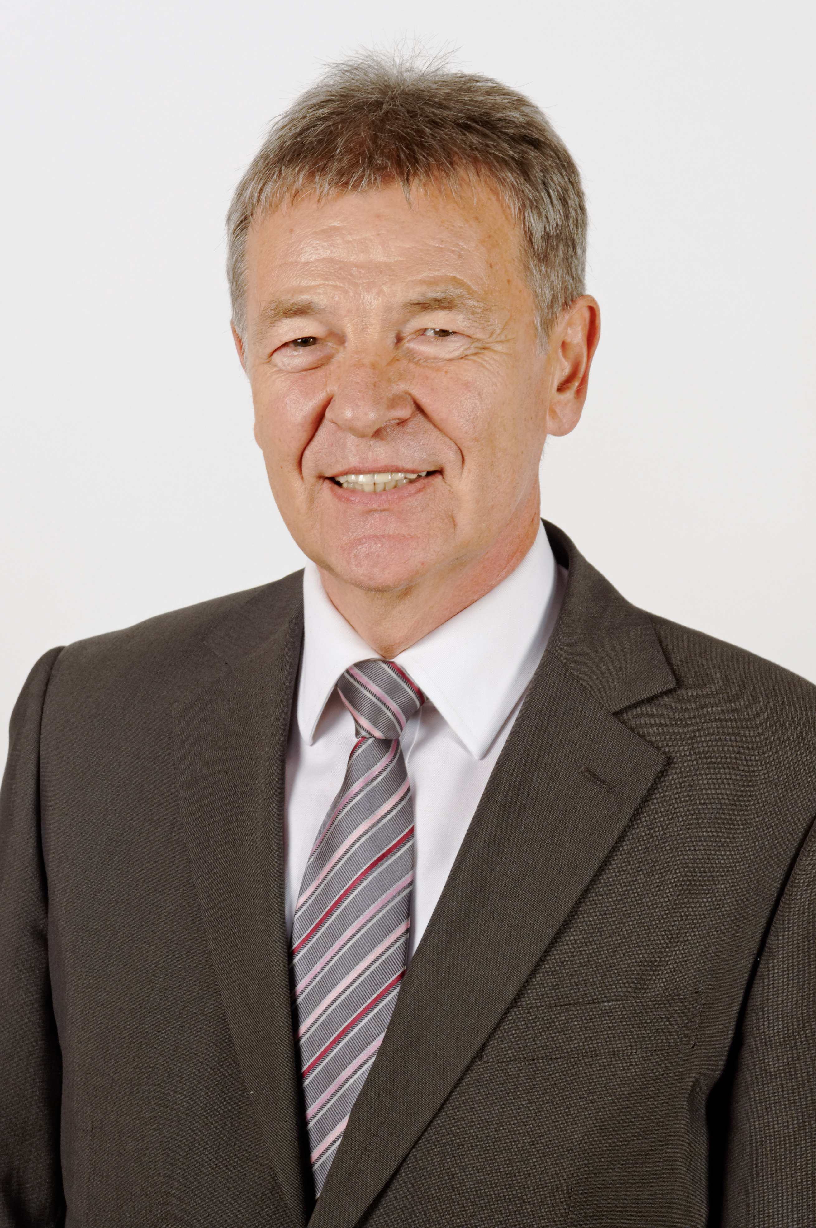 Landtagsprojekt Bayern